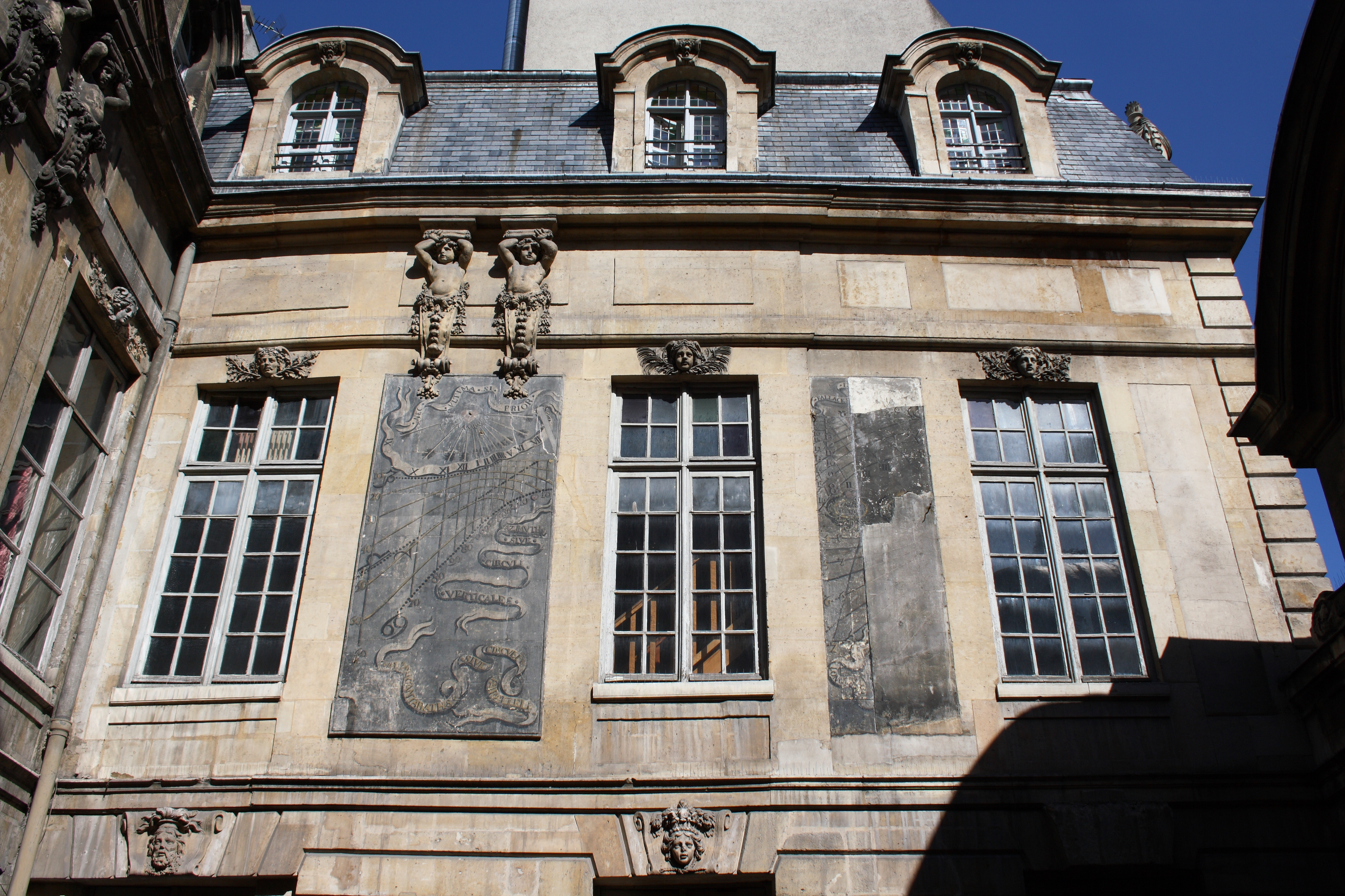 Hôtel Amelot de Bisseuil (47, rue Vieille-du-Tempel bzw. 10, rue des Guillemites im 4. Arrondissement von Paris), erster Hof, an der Fassade zwei Tafeln mit Grisaillemalerei, Darstellung: Sonnenuhren, von Jean Truchet